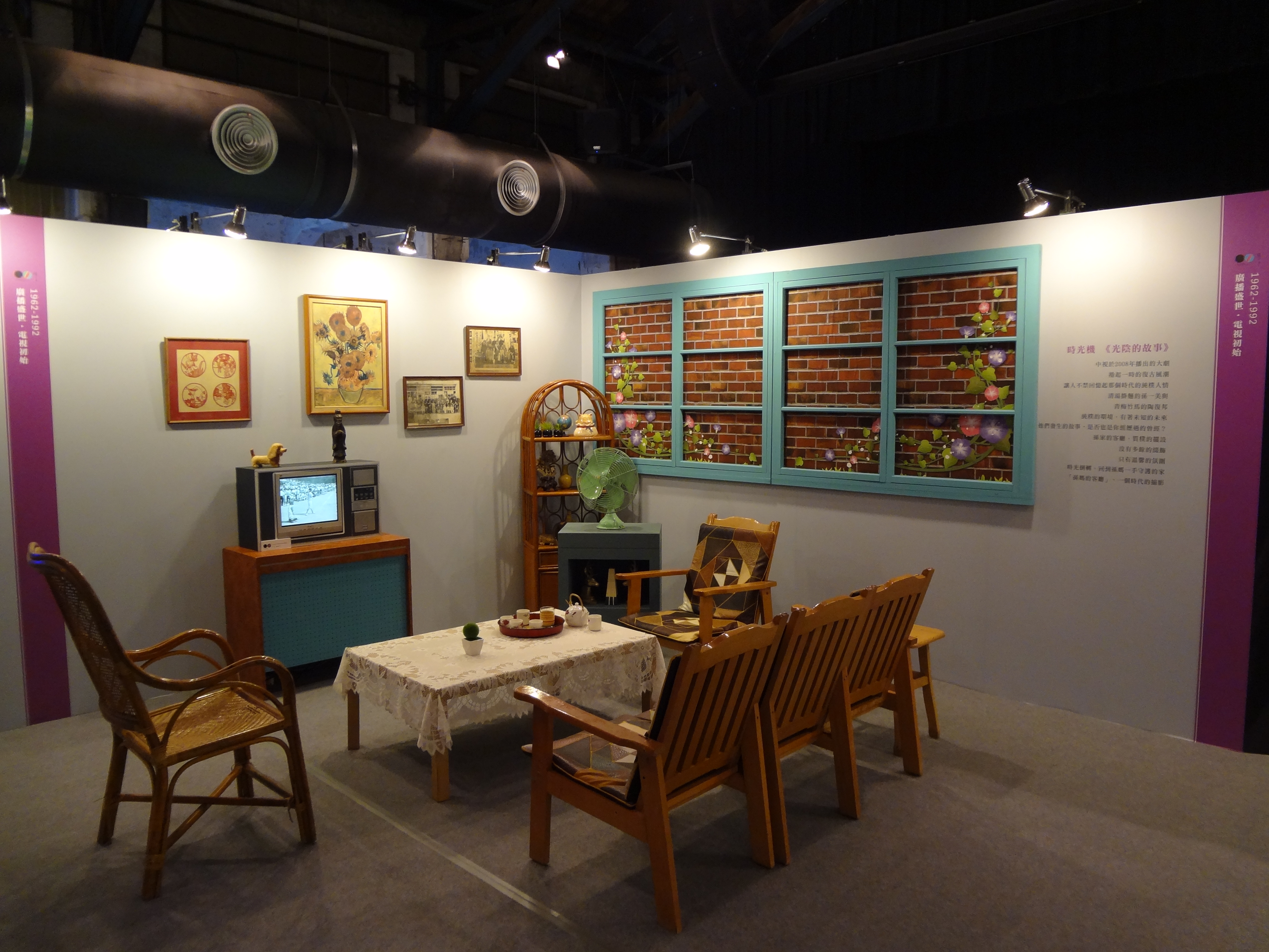 中文（台灣）: 「金鐘五十．響 特別展」廣播盛世．電視初始區，中國電視公司八點檔連續劇《光陰的故事》孫家客廳場景佈置，電視躍居重要擺設，象徵1960～70年代臺灣社會電視文化的黎明期。場景前方的歌林黑白電視機，映像管被移除，裝入優派液晶顯示器。